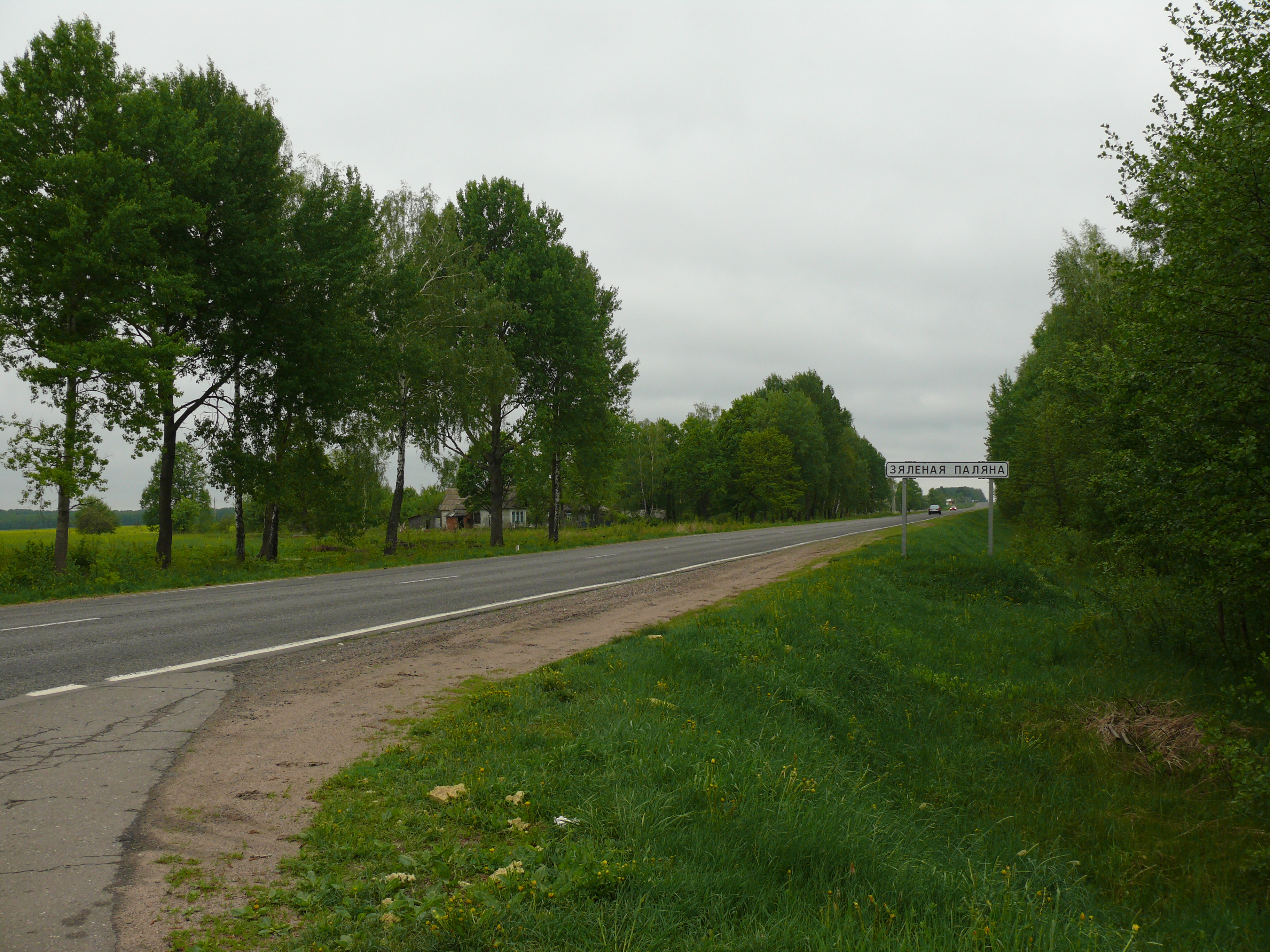 Wieś Zielona Polana w rejonie Czeczerskim obwodu Homelskiego